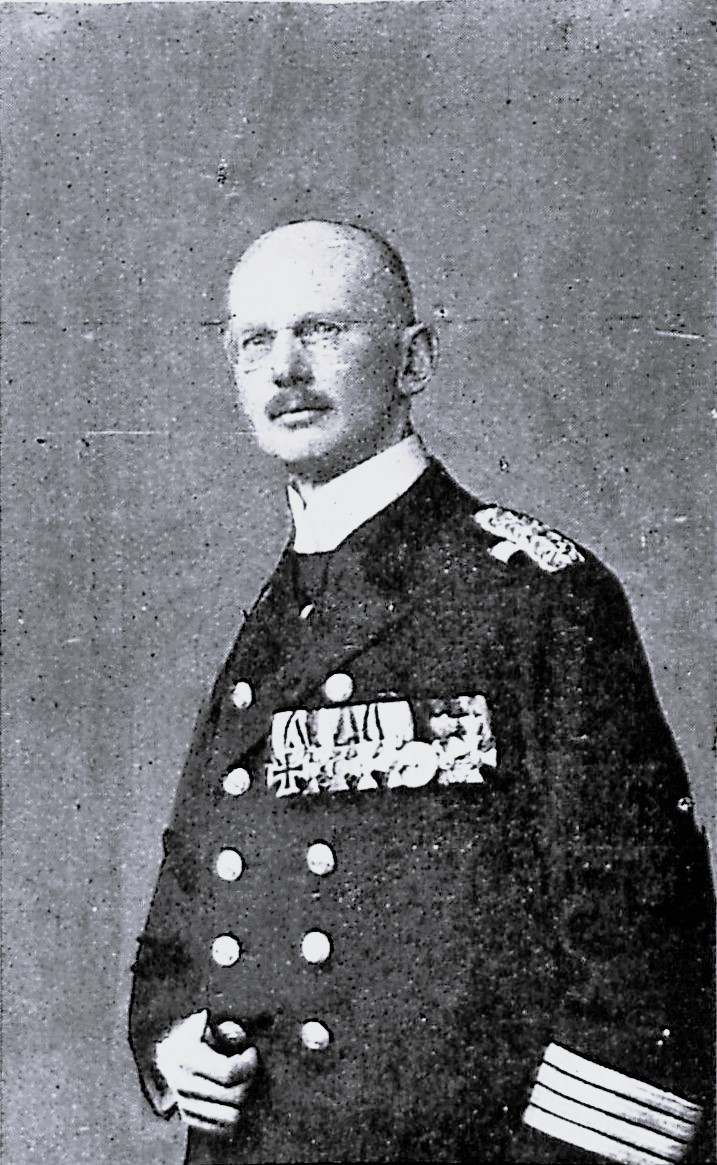 Geheimer Marinebaurat August Müller.